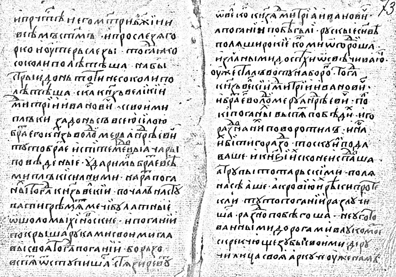 Лл. 72 об. и 73 из "Задонщины" по списку ГИМ № 3045 (из Музейского собрания). Воспроизводится по изданию Яна Фрчека (1948).